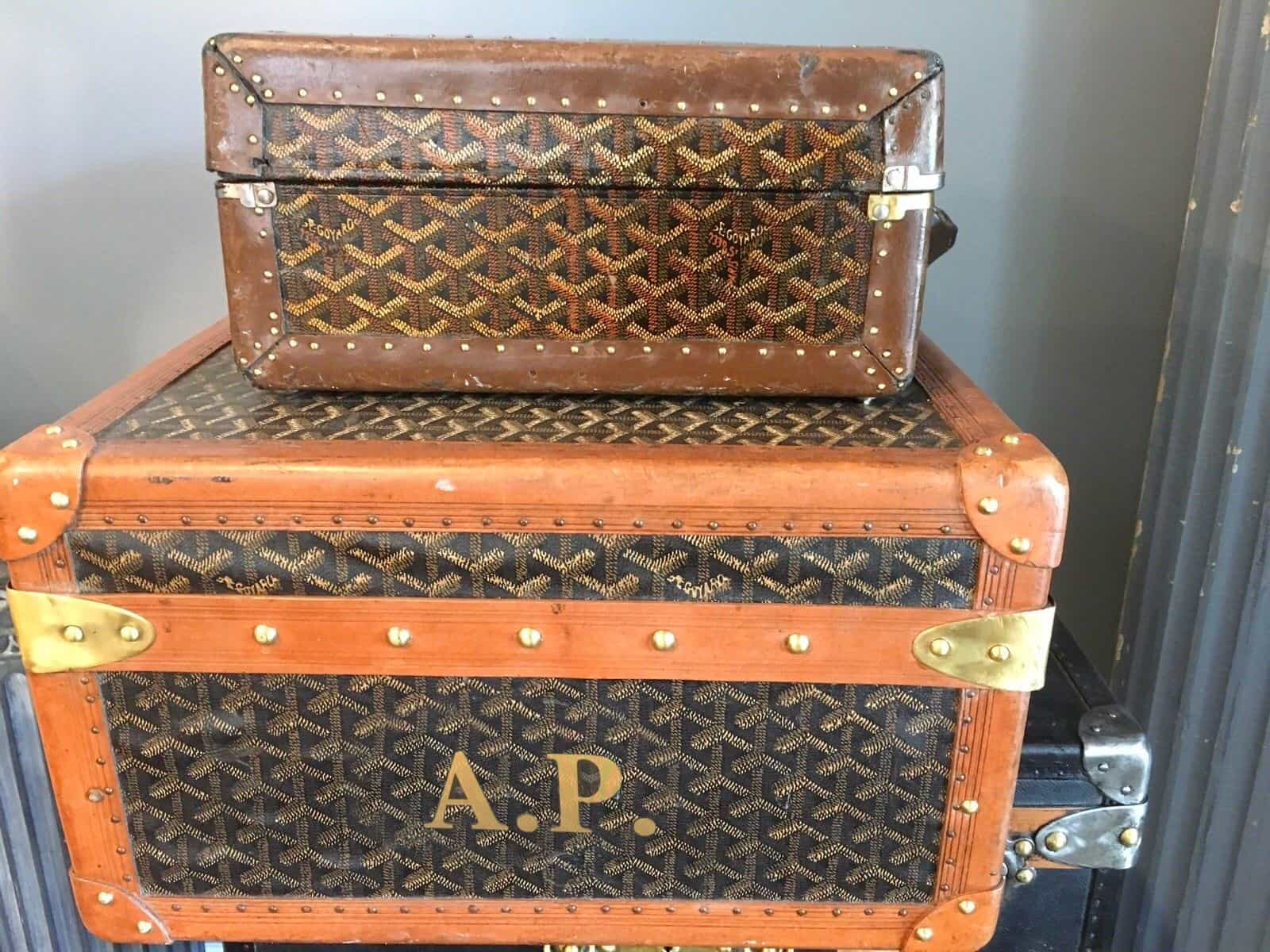 Куфар Goyard на А.Пискюлиев